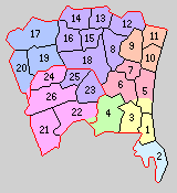 千葉県長生郡の町村。